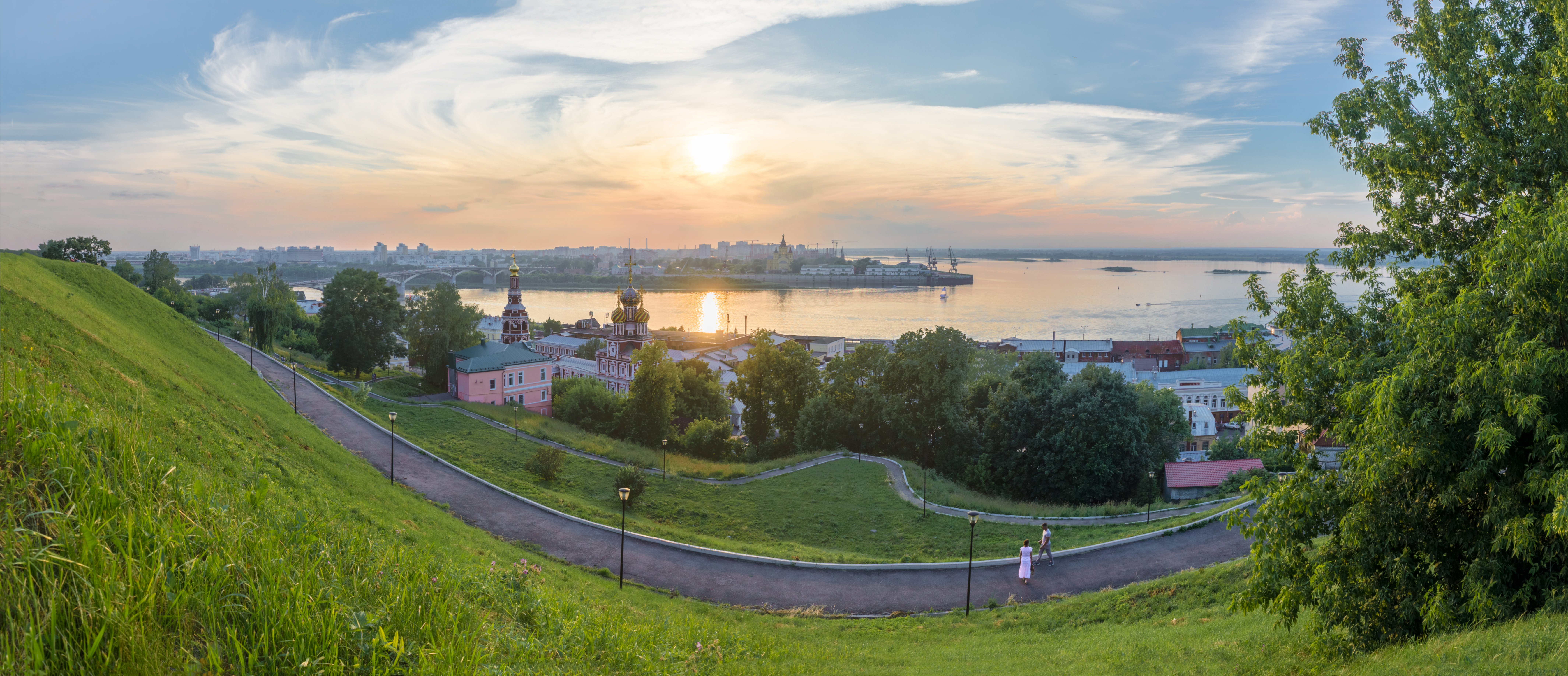 Панорамный вид на Рождественскую церковь, Рождественскую улицу и стрелку с моста на Федоровского